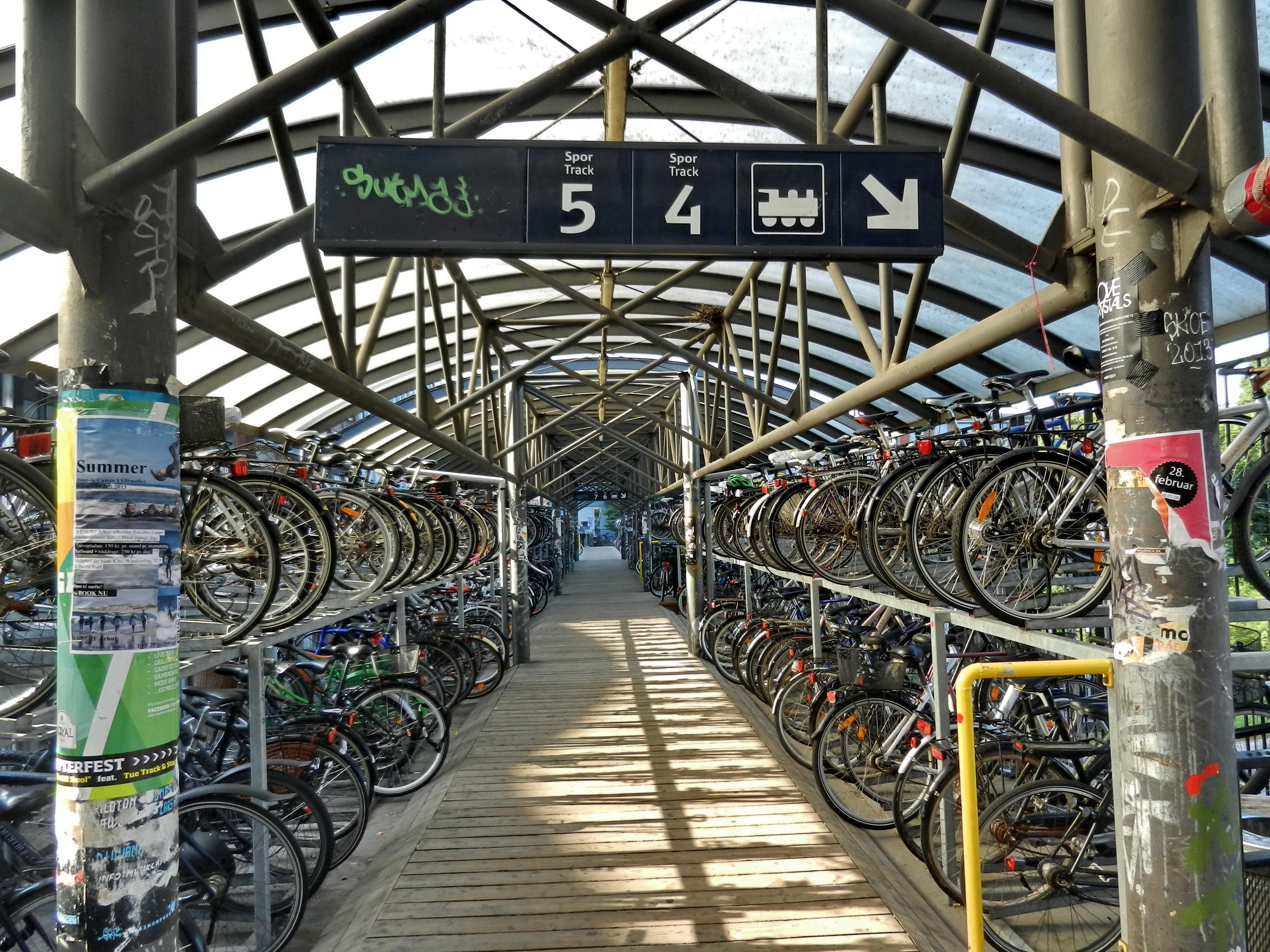 Aarhus